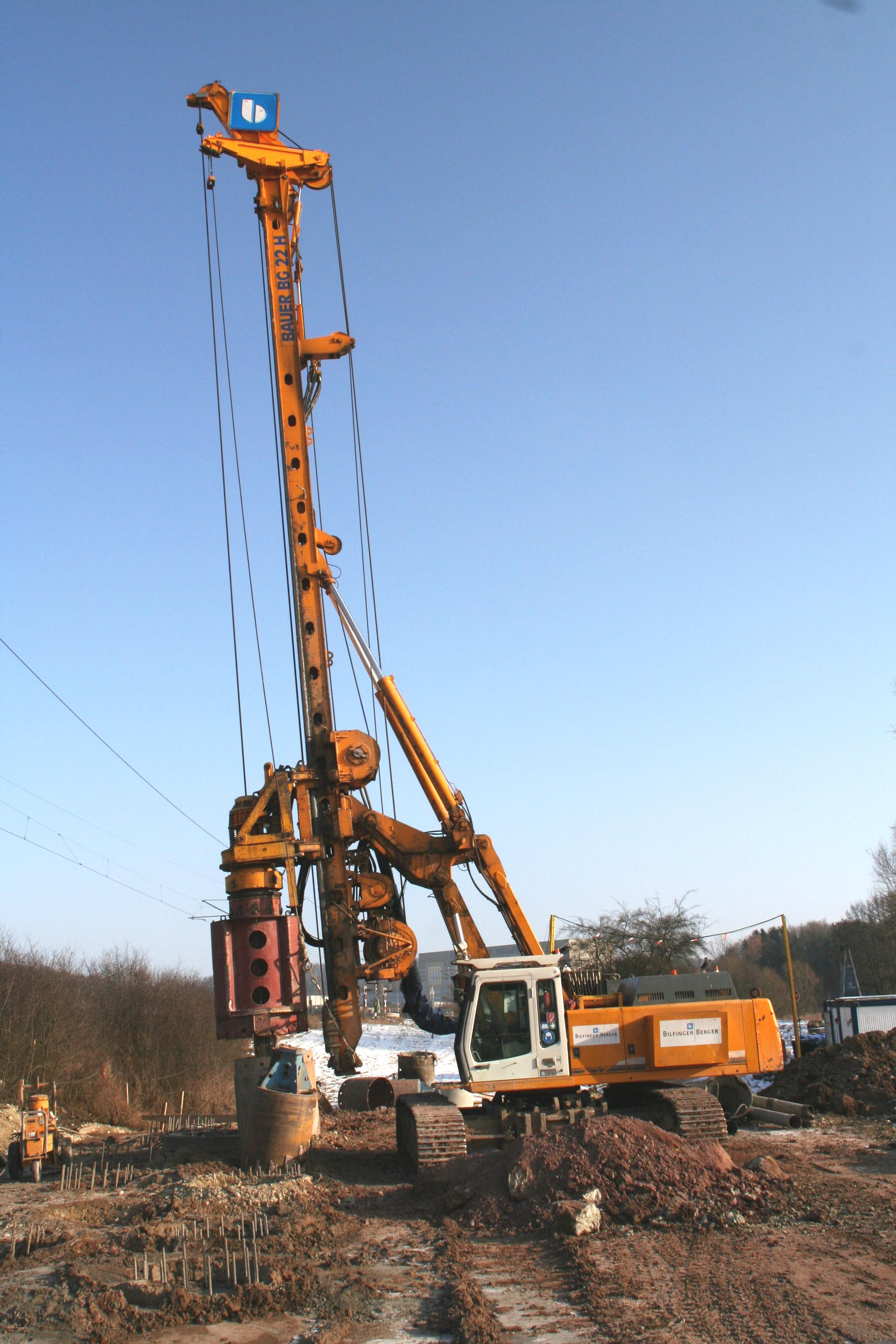 Drehbohrgerät BG 22 (A73 Füllbachbrücke) - rotary drilling rig